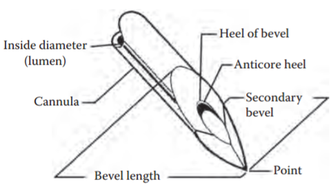 Croquis describiendo las partes que integran un aguja hipodérmica (etiquetas en inglés).